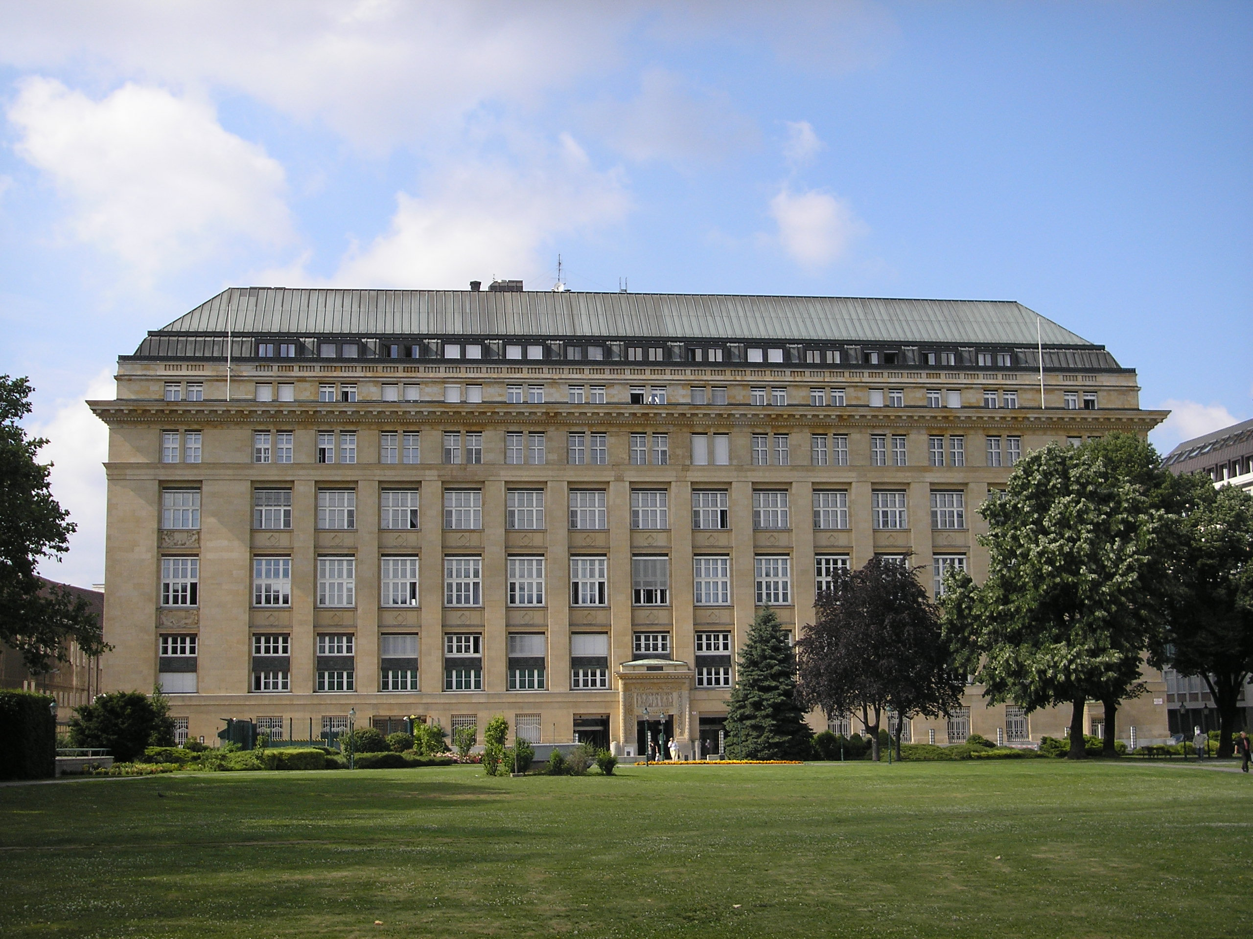 Austrian National Bank (Österreichische Nationalbank) in Vienna